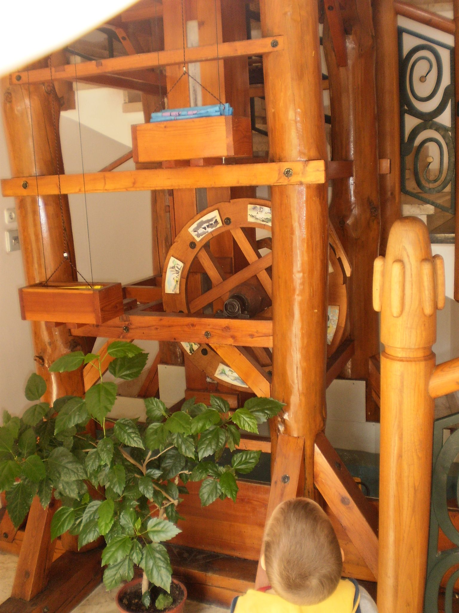 "Water machine", Duna múzeum, Esztergom, Hungary